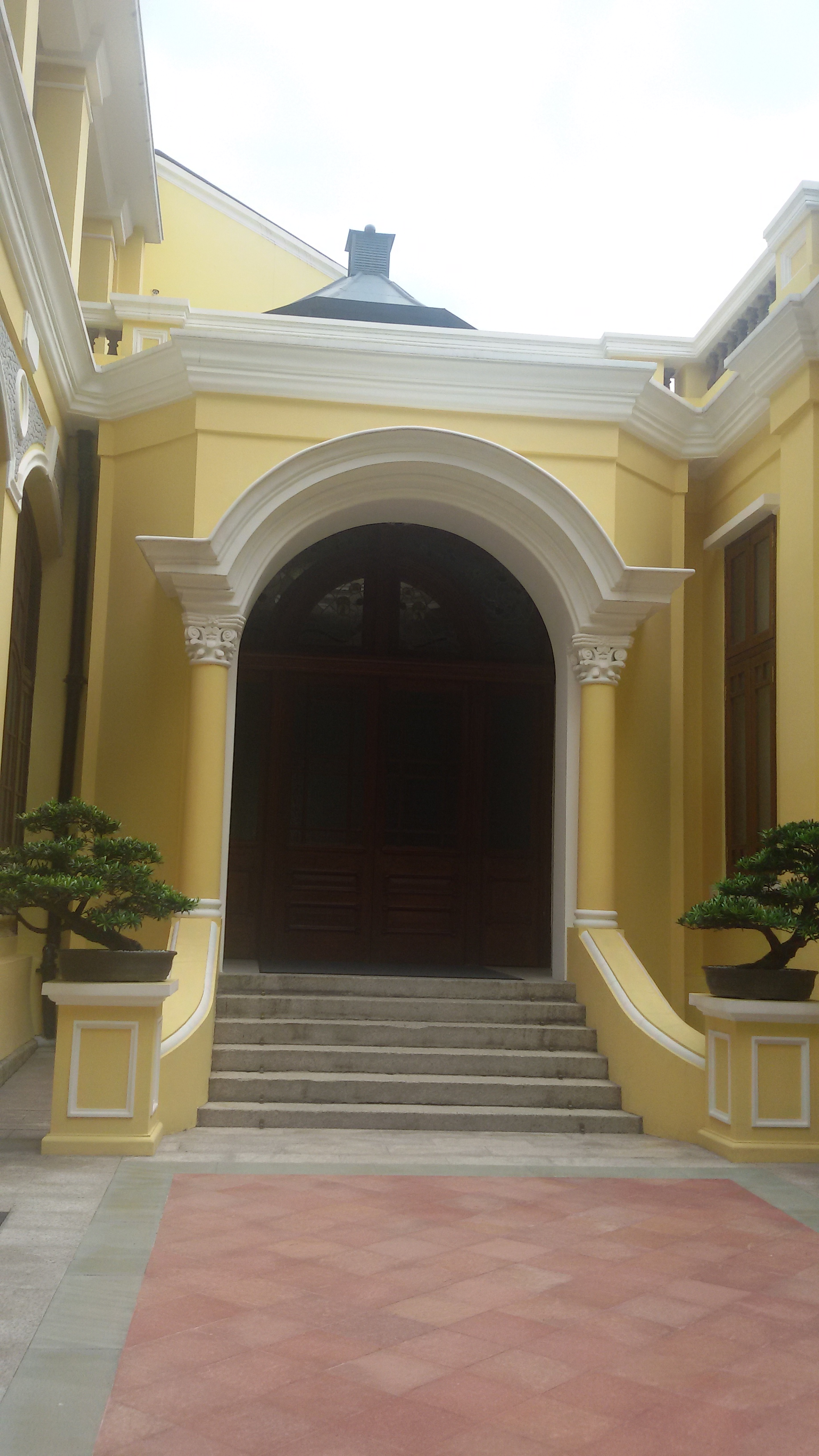 粵語: 廣東外事俱樂部